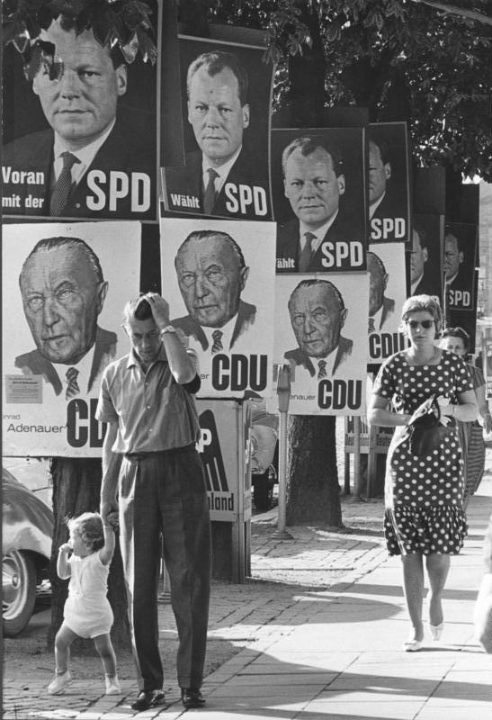 Bonn, Bundestagswahl, Wahlplakate Bundestagswahl 1961 Wahlplakate in Bonn [Bonn.- Bundestagswahl, Wahlplakate der SPD („Voran mit der SPD“, Porträt Willy Brandt) und CDU (Porträt Konrad Adenauer) an Straßenbäumen, Passanten (Mann mit Kind, Frau)] Information added by Wikimedia users.